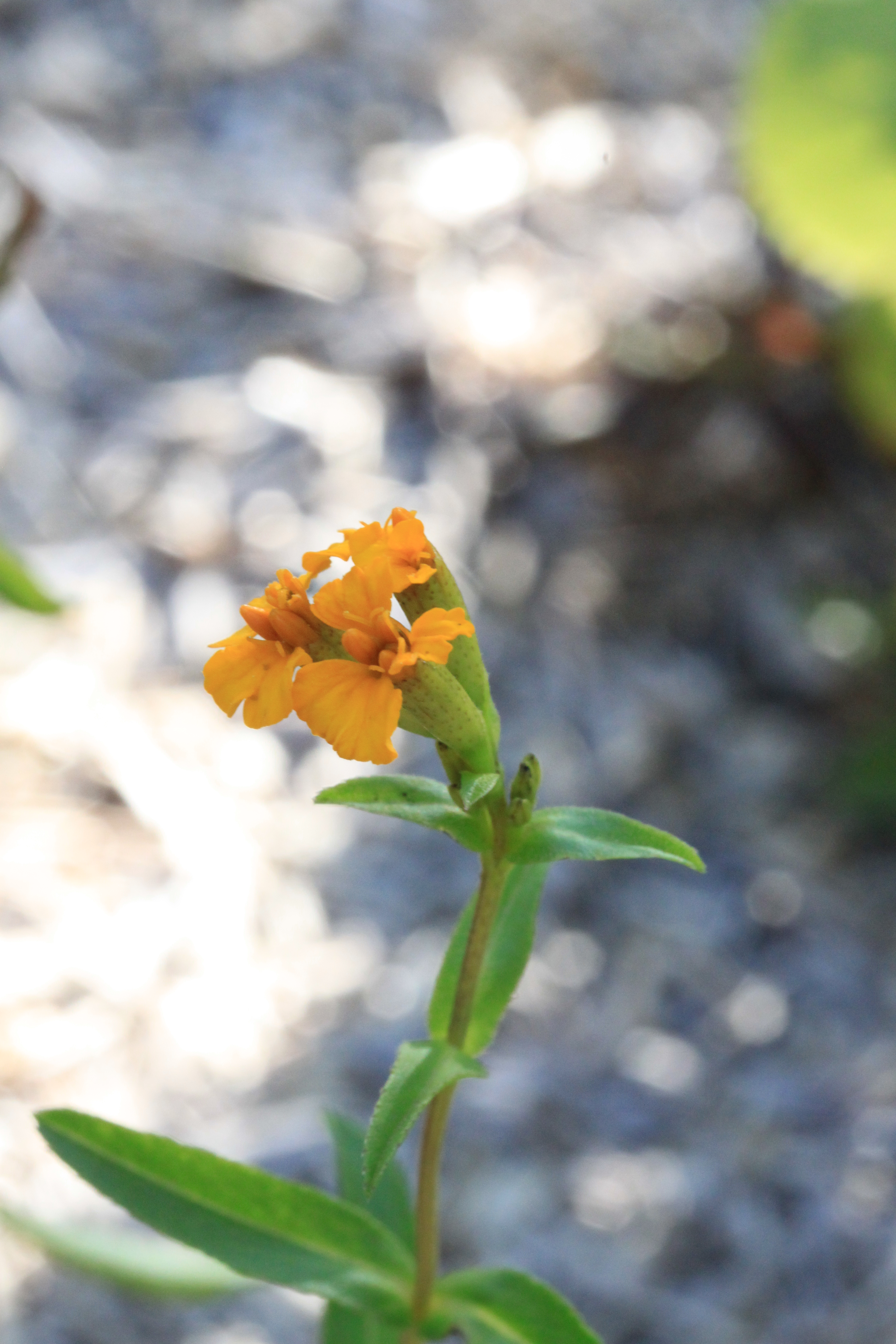 Tagète luisante